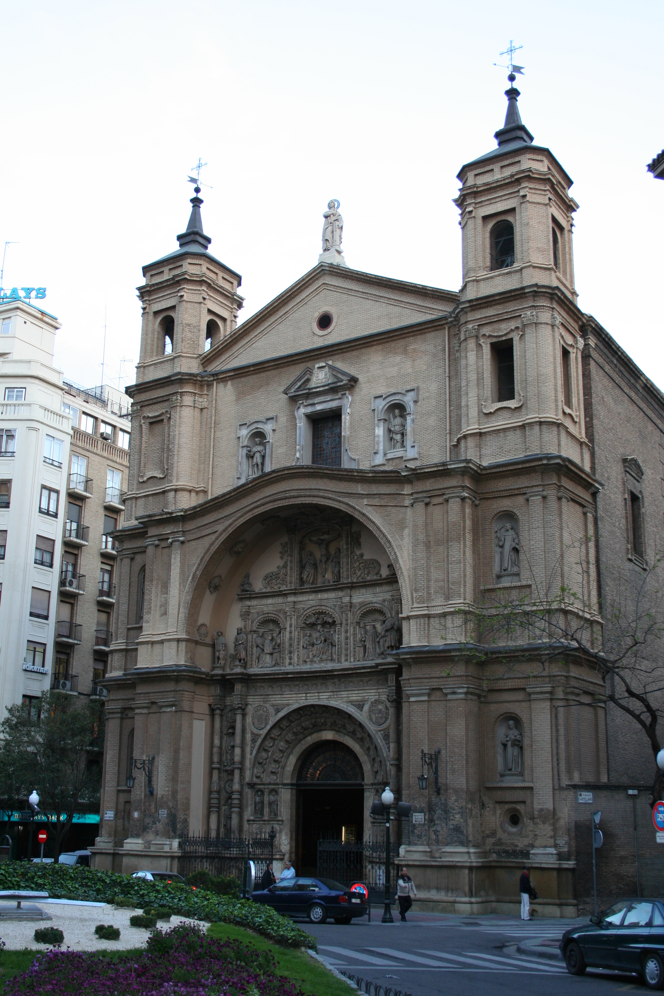 Iglesia Basílica de Santa Engracia de Zaragoza